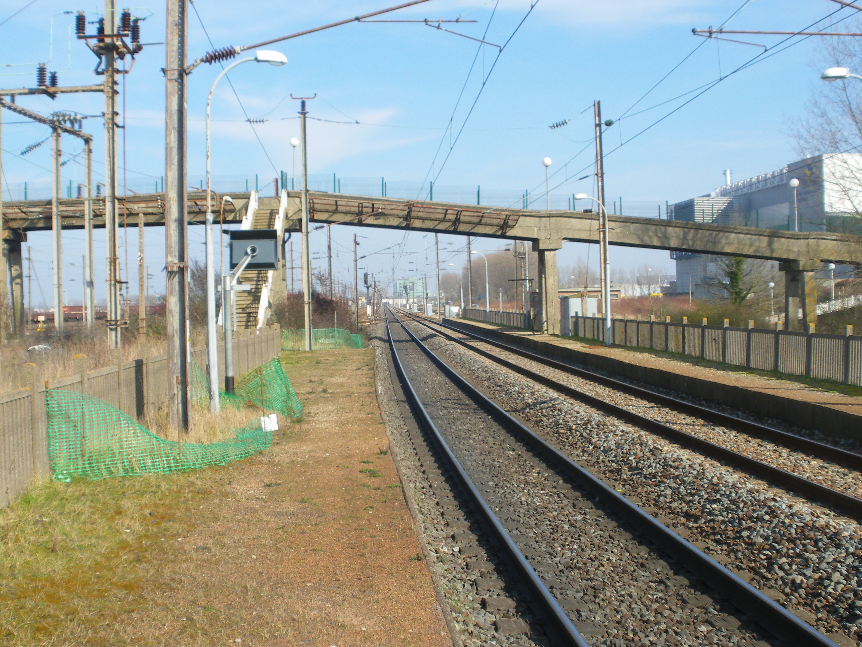 Vue des voies et des quais de la gare de Grande-Synthe.